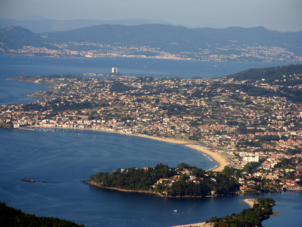 Playa América Nigrán Galicia